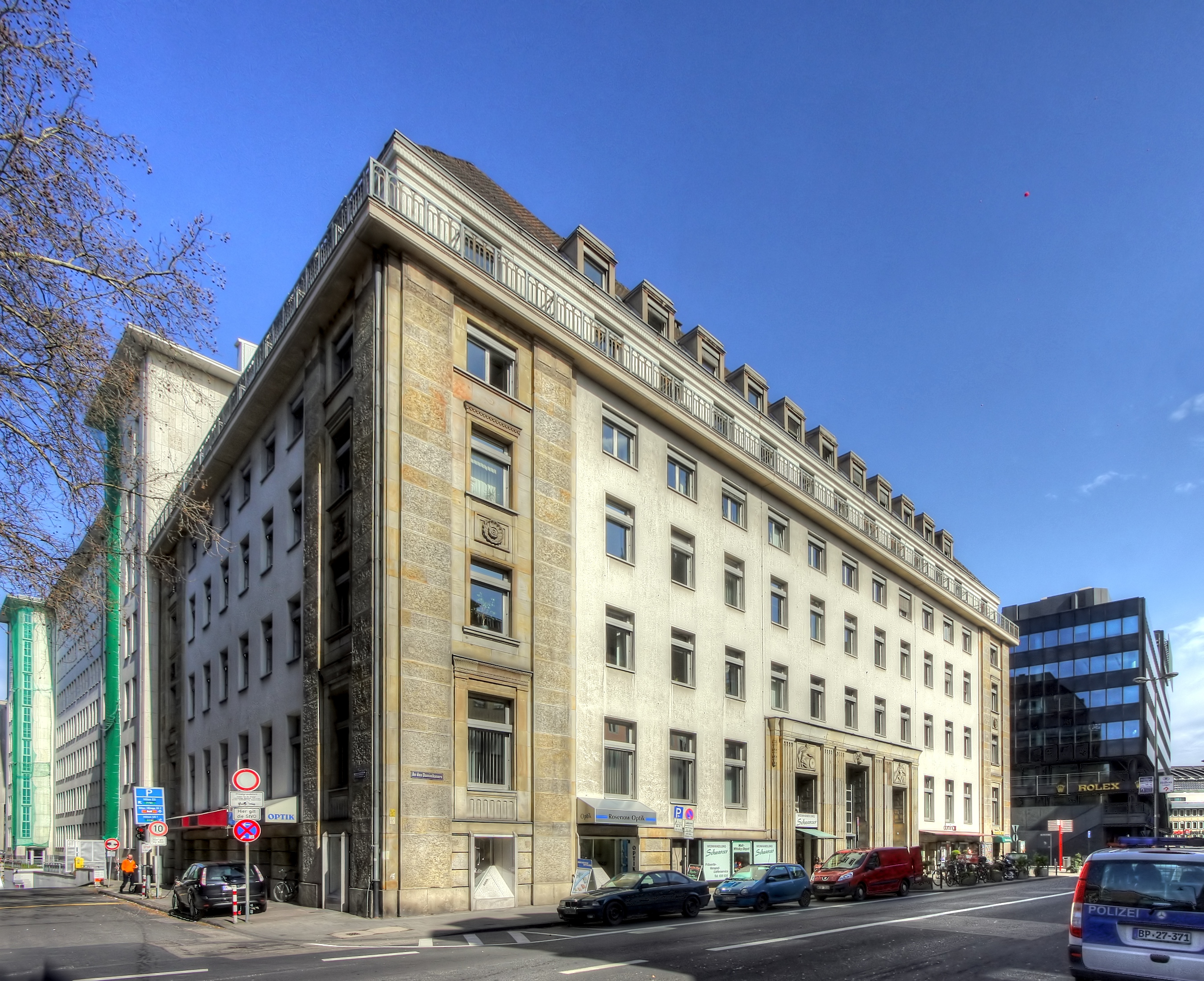 Sozialgericht Köln, An den Dominikanern 2, Köln. Architekt: Carl Moritz, Baujahr: 1923. Ehemals Darmstädter- und Nationalbank.